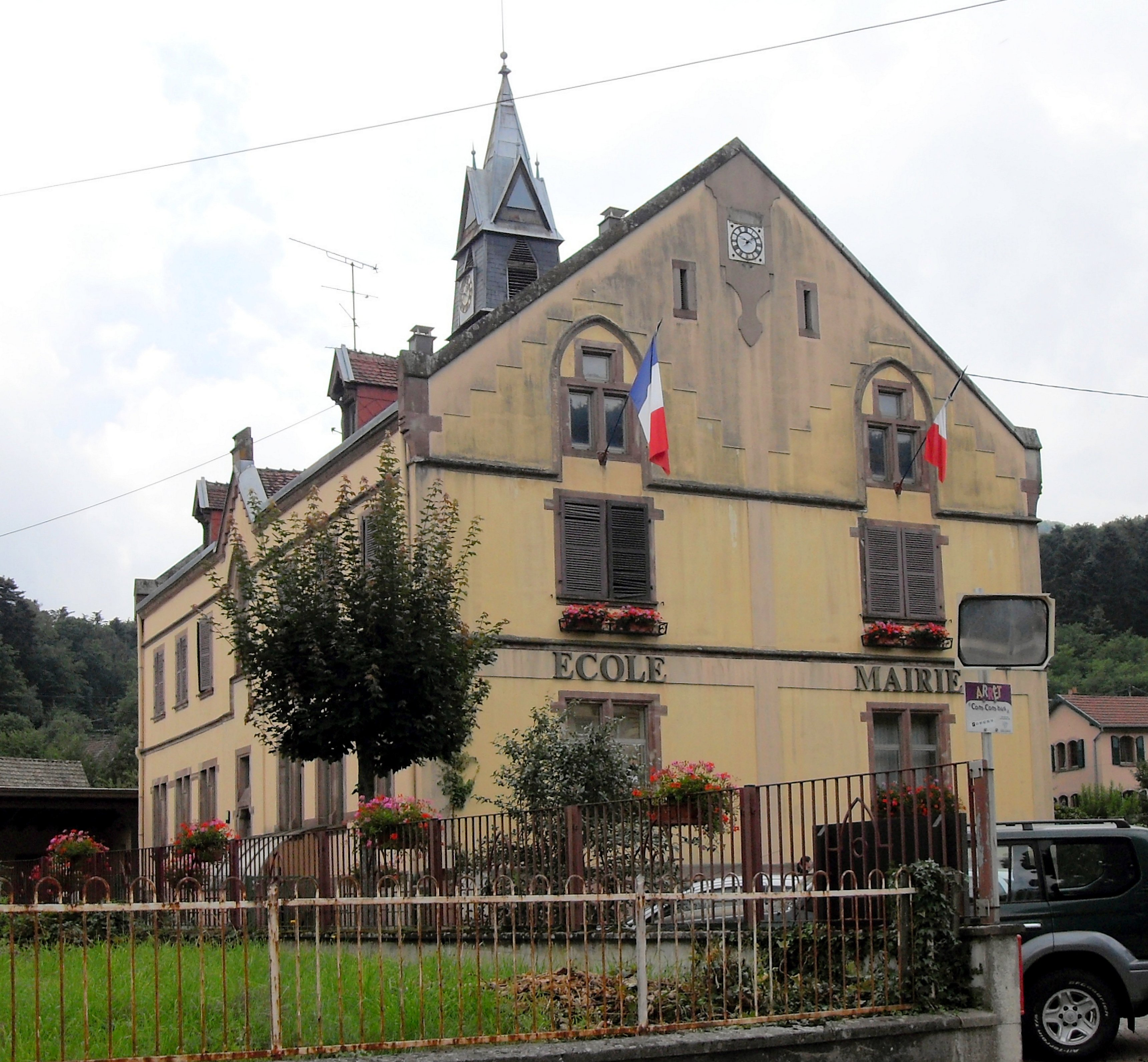 L'école et la mairie de Jungholtz